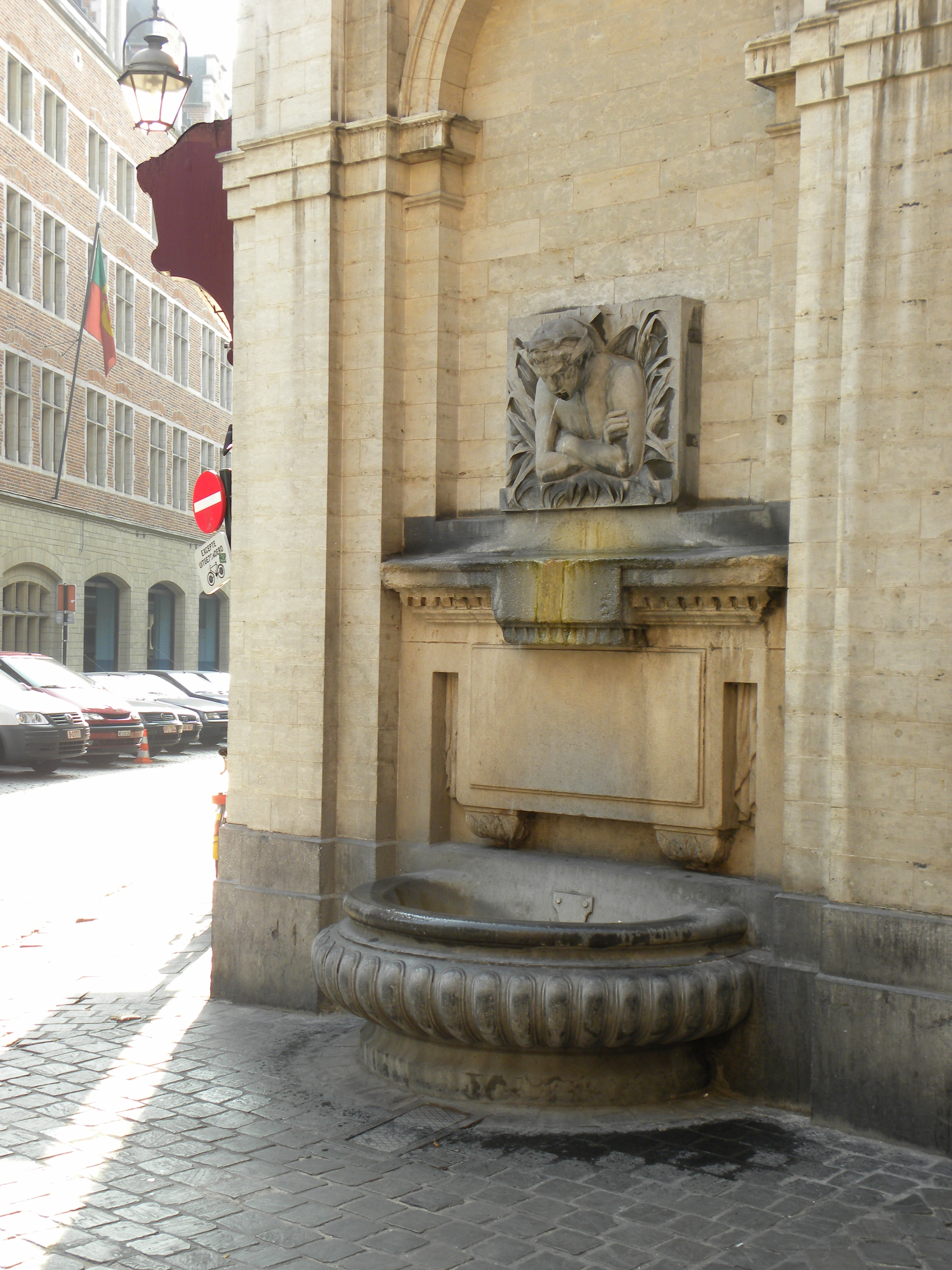 Fontaine le Cracheur